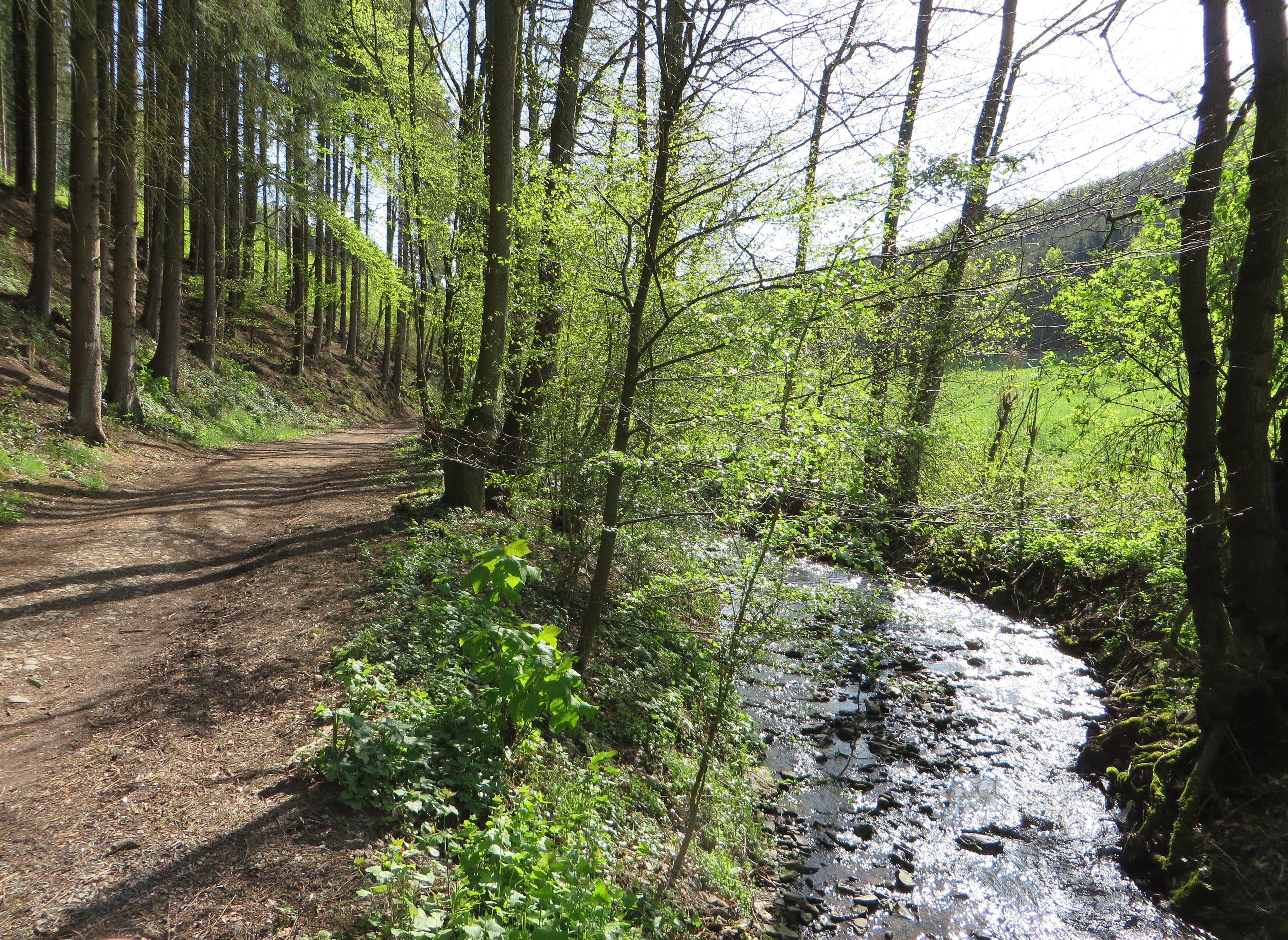 Naturschutzgebiet Holthauser Bachtal (HA-020) in Hagen-Holthausen. Auf dem Foto rechts der Holthauser Bach, links der Wanderweg „Klippchen“. Der Holthauser Bach hat eine Länge von ca. 5 km, entspringt bei Brechtefeld und fließt ab da durch das Holthauser Bachtal, den Ortsteil Holthausen und mündet auf Hohenlimburger Gebiet in die Lenne. Das Schutzgebiet liegt südlich von Holthausen. Es umfaßt ein z.T. naturnah ausgebildetes Bachtal, daß Kerb- und Sohlentalabschnitte aufweist, mit angrenzenden Laubholzbeständen und seitlichen Zuflüssen. Der Bach ist im unteren Bereich z.T. begradigt und befestigt.